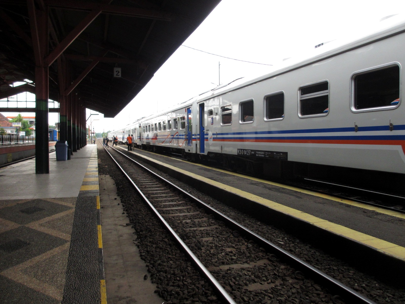 KA Jayabaya di Stasiun Surabaya Pasarturi.